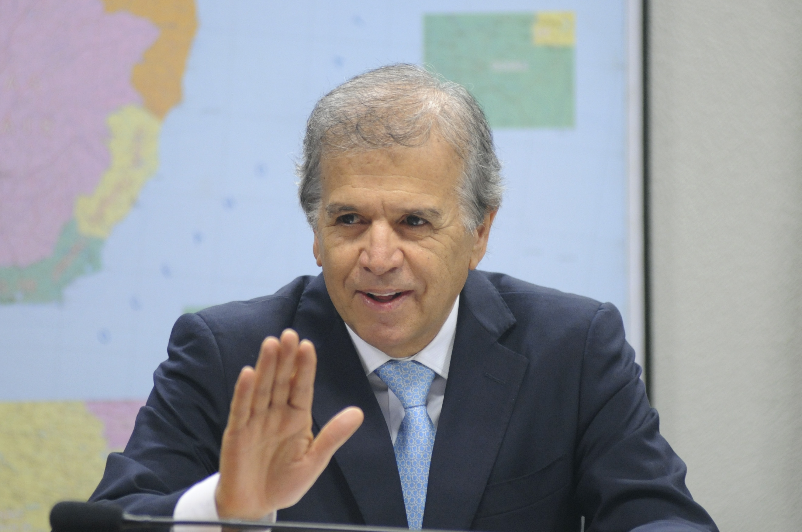 Comissão de Serviços de Infraestrutura (CI) realiza audiência pública interativa com a participação do ministro-chefe da Secretaria de Portos, Edinho Araújo, para discutir o Programa de Concessão de Portos. Em pronunciamento, o ministro de Estado Chefe da Secretaria de Portos da Presidência da República, Edinho Araújo. Foto: Pedro França/Agência Senado